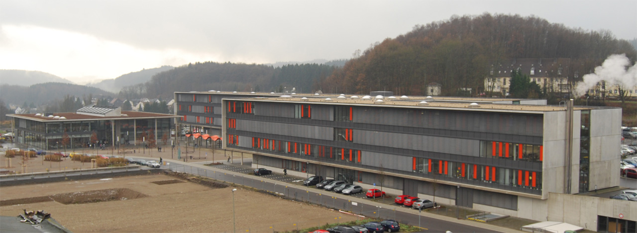 Campus Gummersbach der Fachhochschule Köln